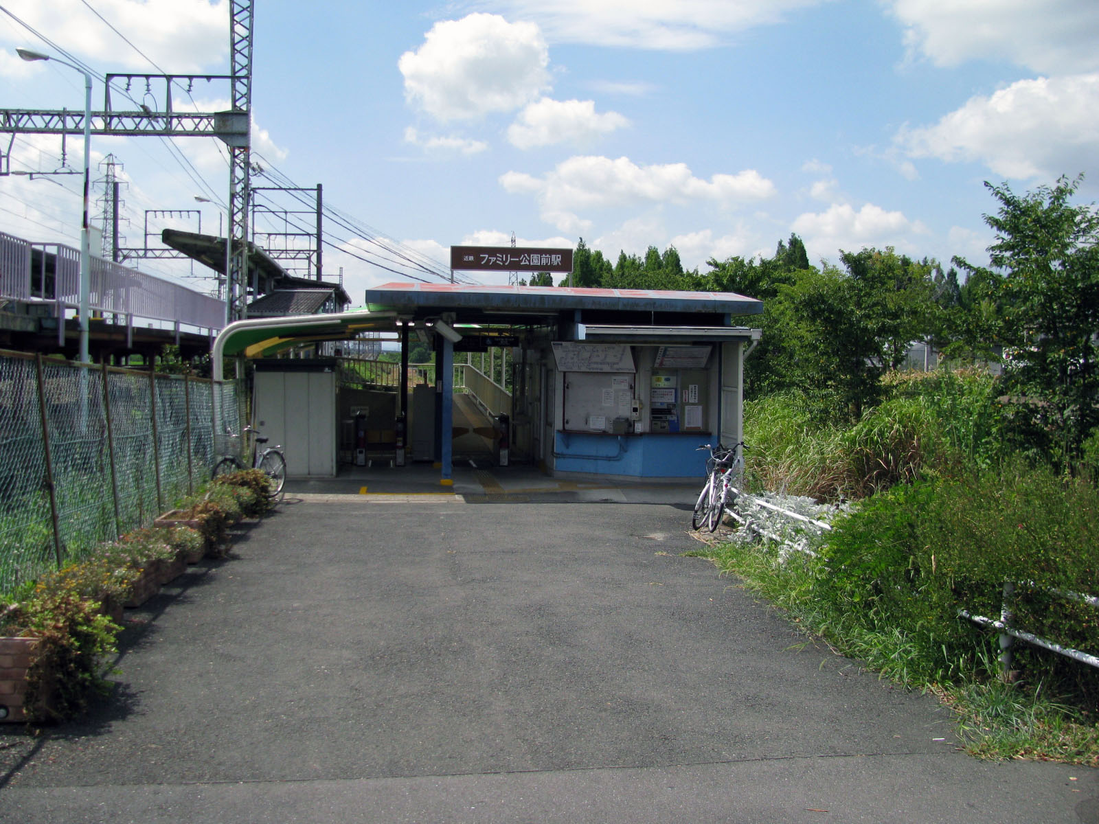 近鉄橿原線ファミリー公園前駅